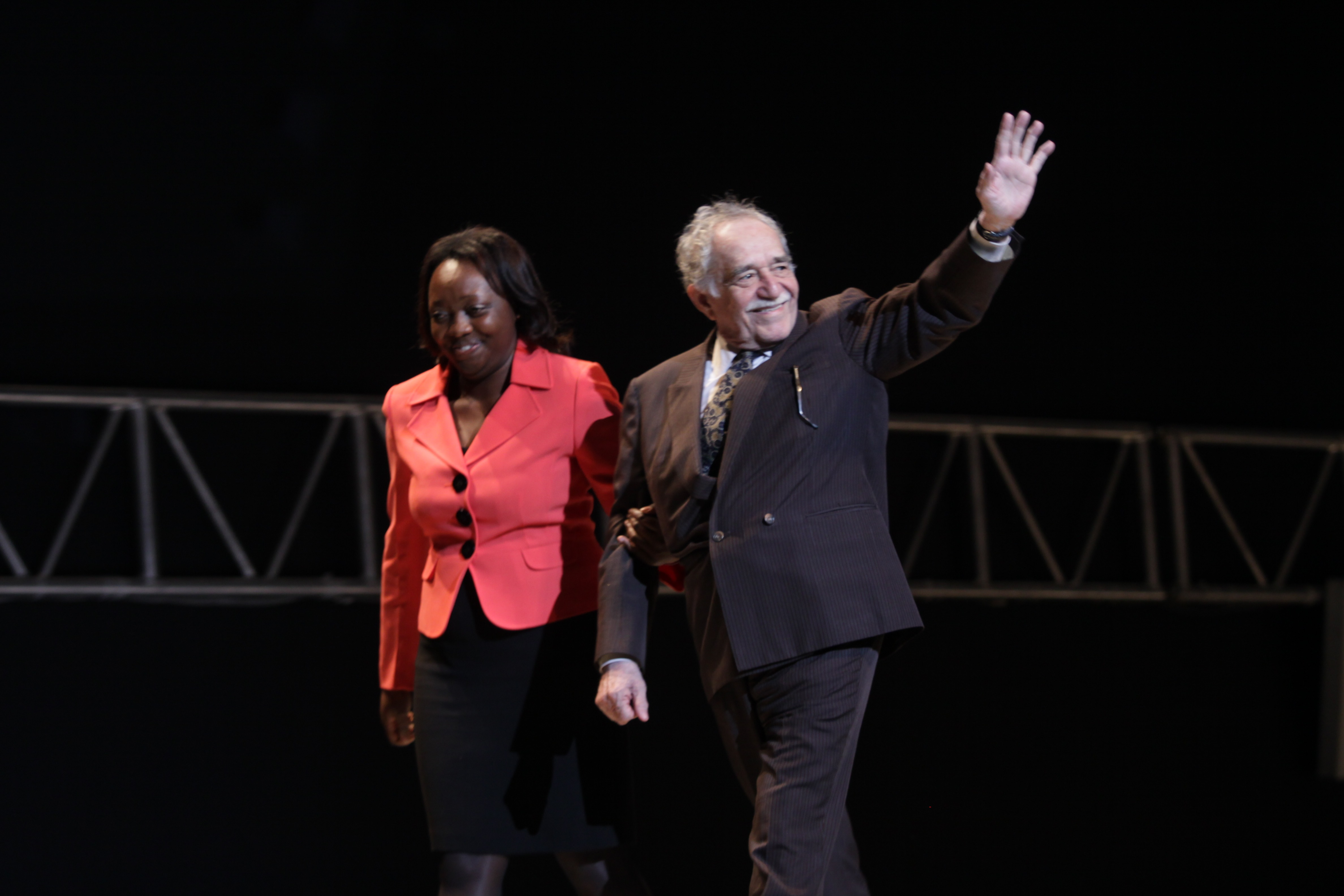 19/03/2009 La Ministra de Cultura de Colombia Paula Moreno y el escritor colombiano Gabriel García Marquez fueron los encargados de entregar el Mayahuel de Plata a Victor Gaviria